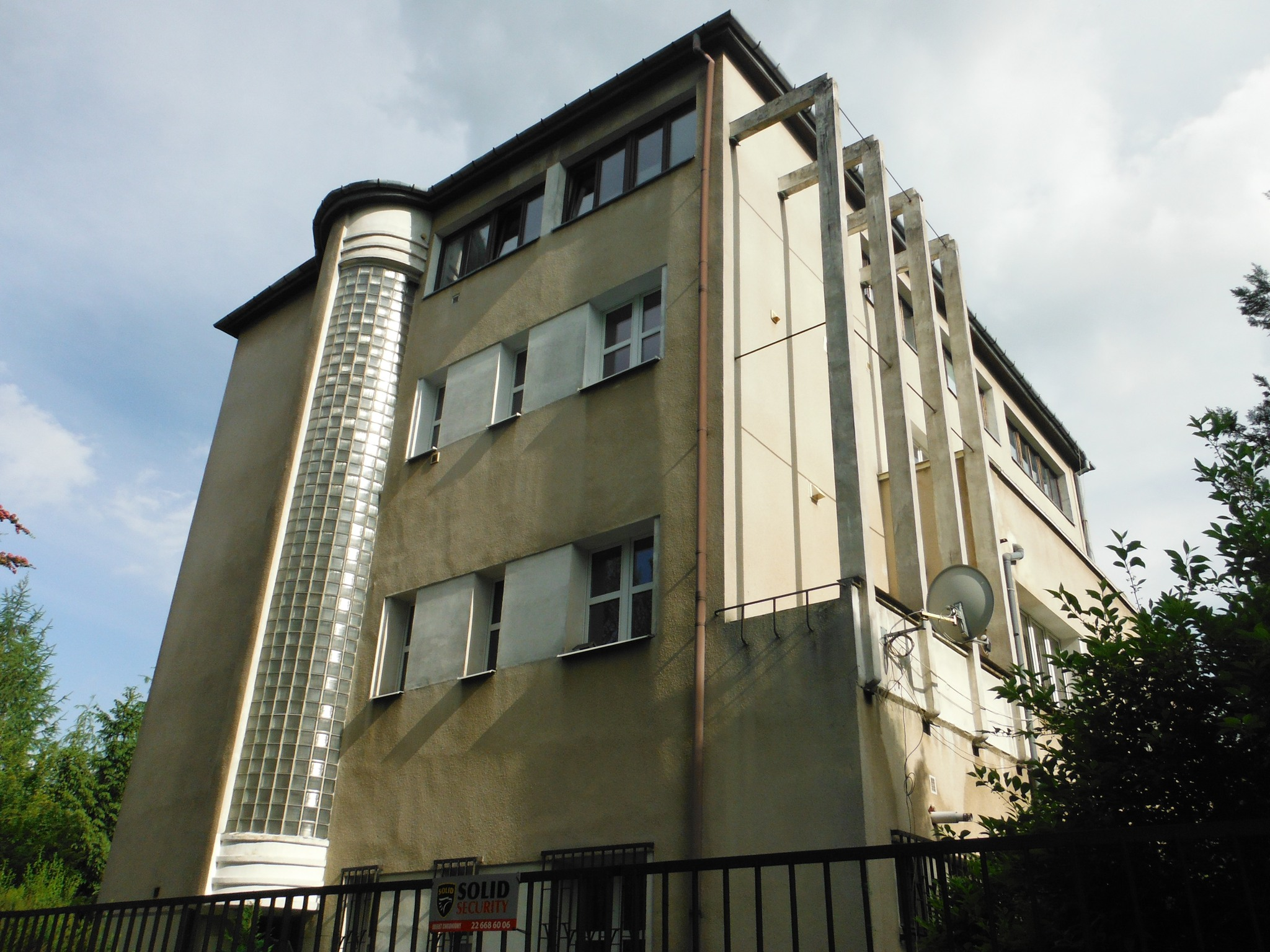 Dom Ambroziewicza (tzw. dom z termometrem, ul. Obrońców 26 w Warszawie), zaprojektowany przez Juliana Ambroziewicza, 1938.